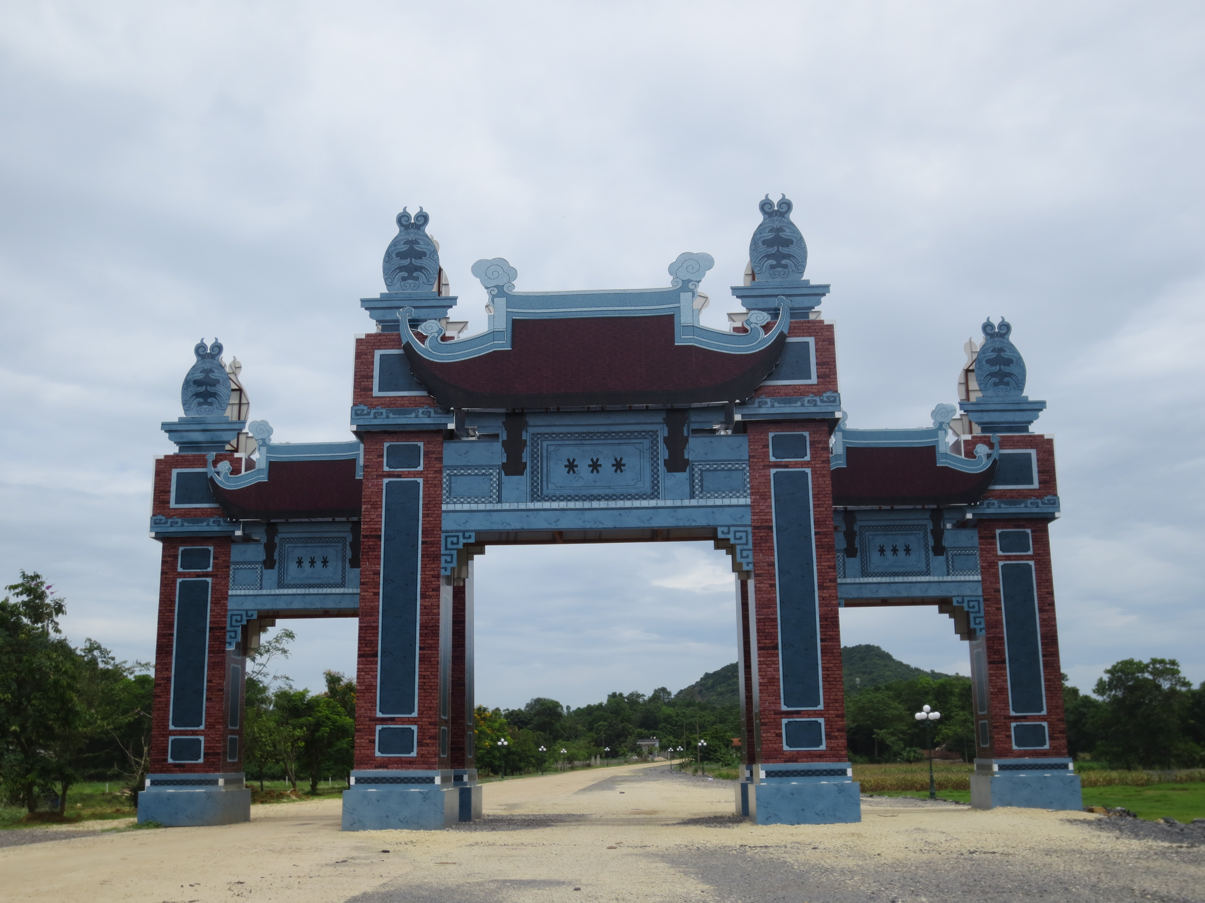 Cổng Nhân Môn Đàn Kính Thiên Tràng An, Ninh Bình